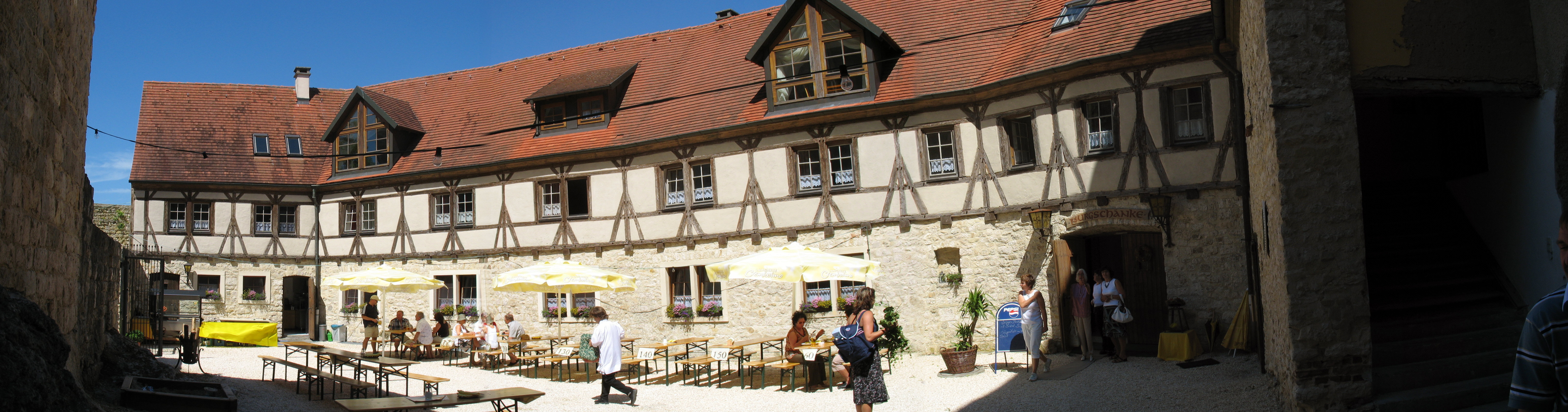 Inner courtyard of Burg Katzenstein at Dischingen